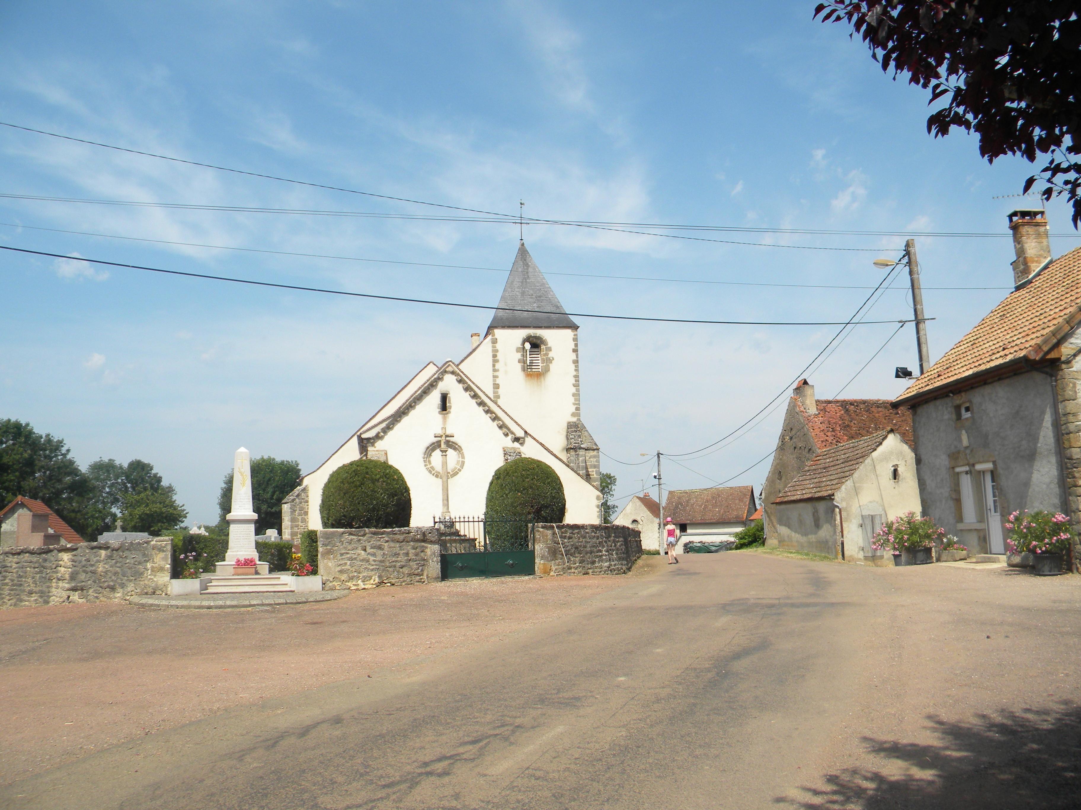 Preĝejo de Culètre